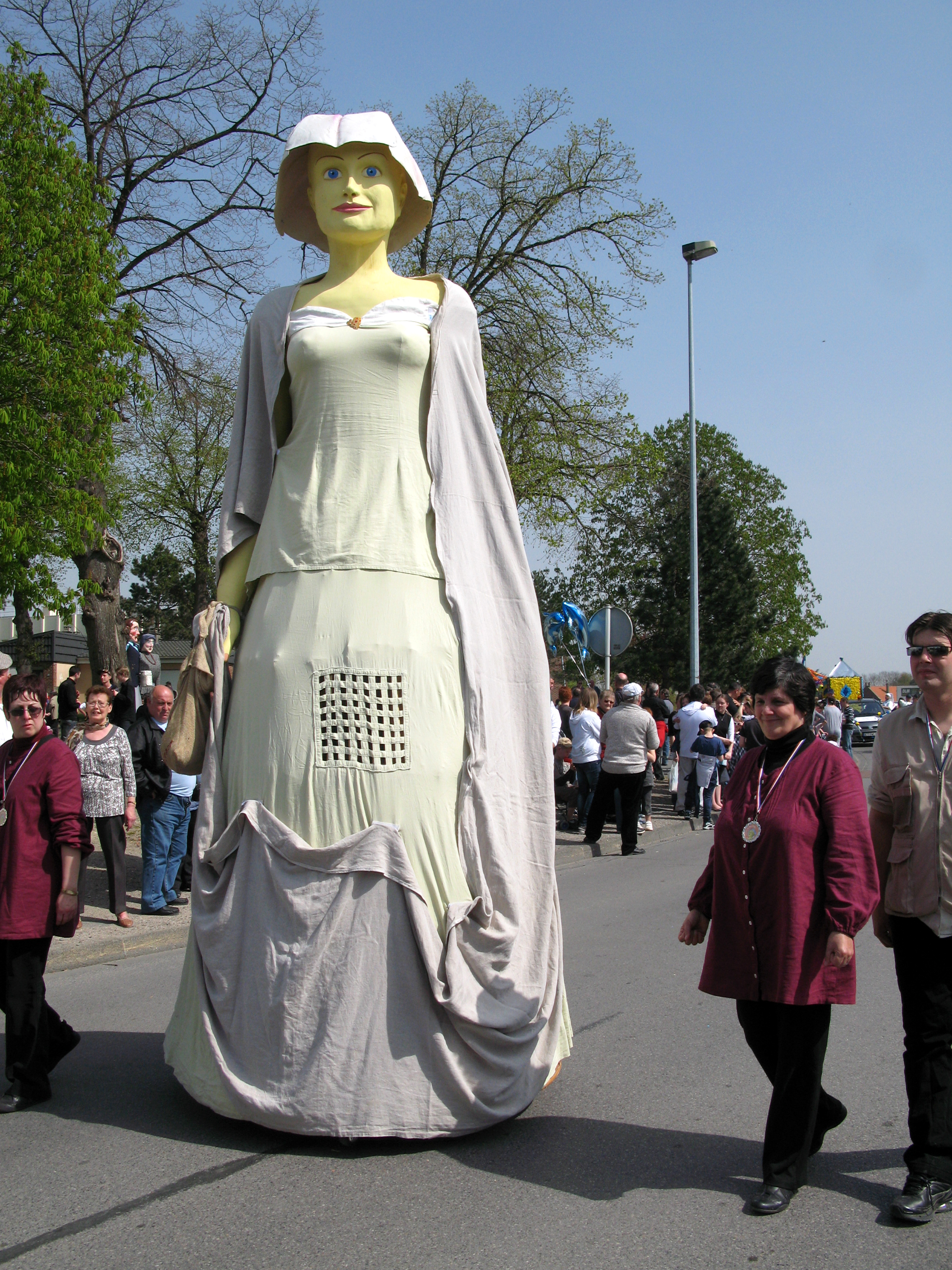 Ham (Somme, France) - Animation festive au centre-ville, un dimanche de printemps. Les géants sont regroupés sur la place du Jeu de Paume, derrière la salle des fêtes, avant la parade. Le premier d'entre eux prévu dans l'ordre de départ est « Madame Bintje », qui commence à descendre la rue du Château (rue André Audinot).